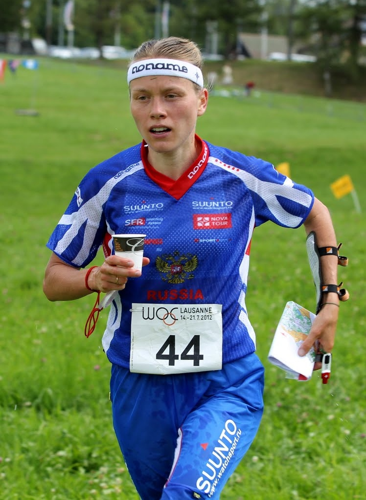 Tatiana Ryabkina (WOC 2012, long)